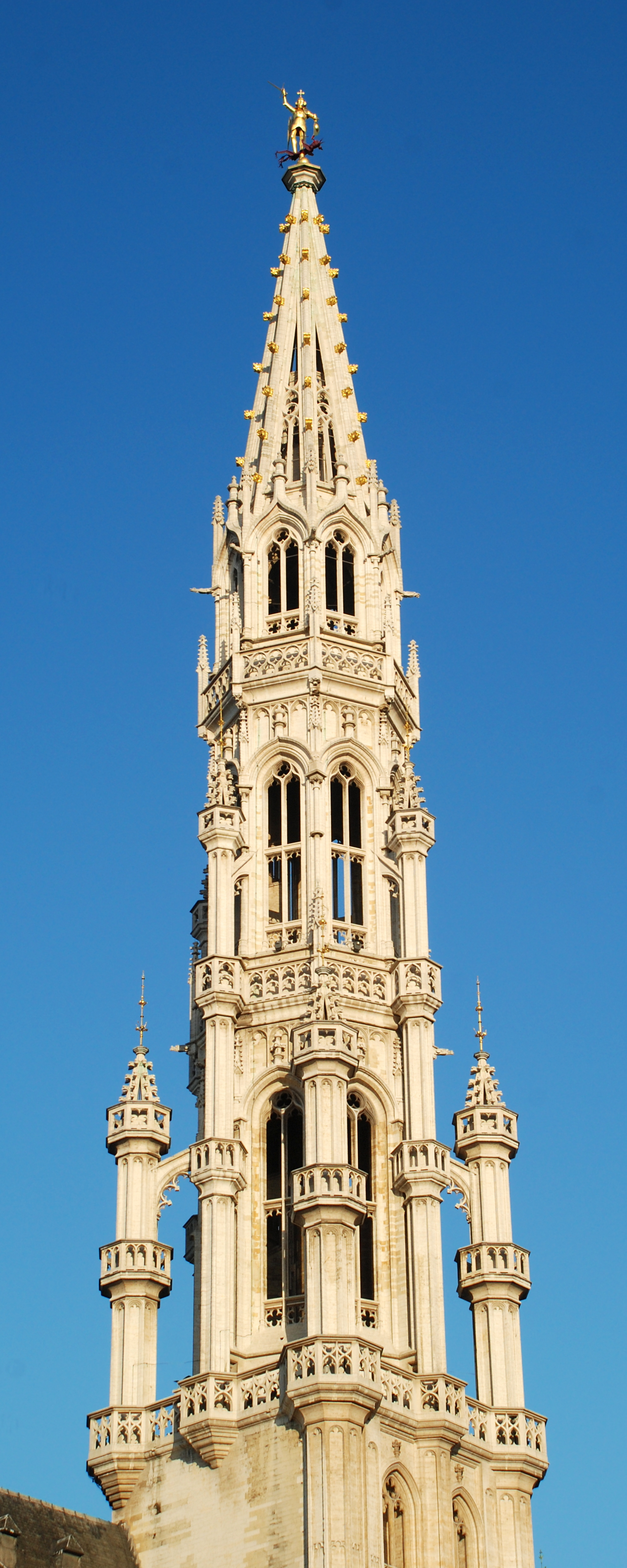 Belgique - Bruxelles - Hôtel de ville de Bruxelles